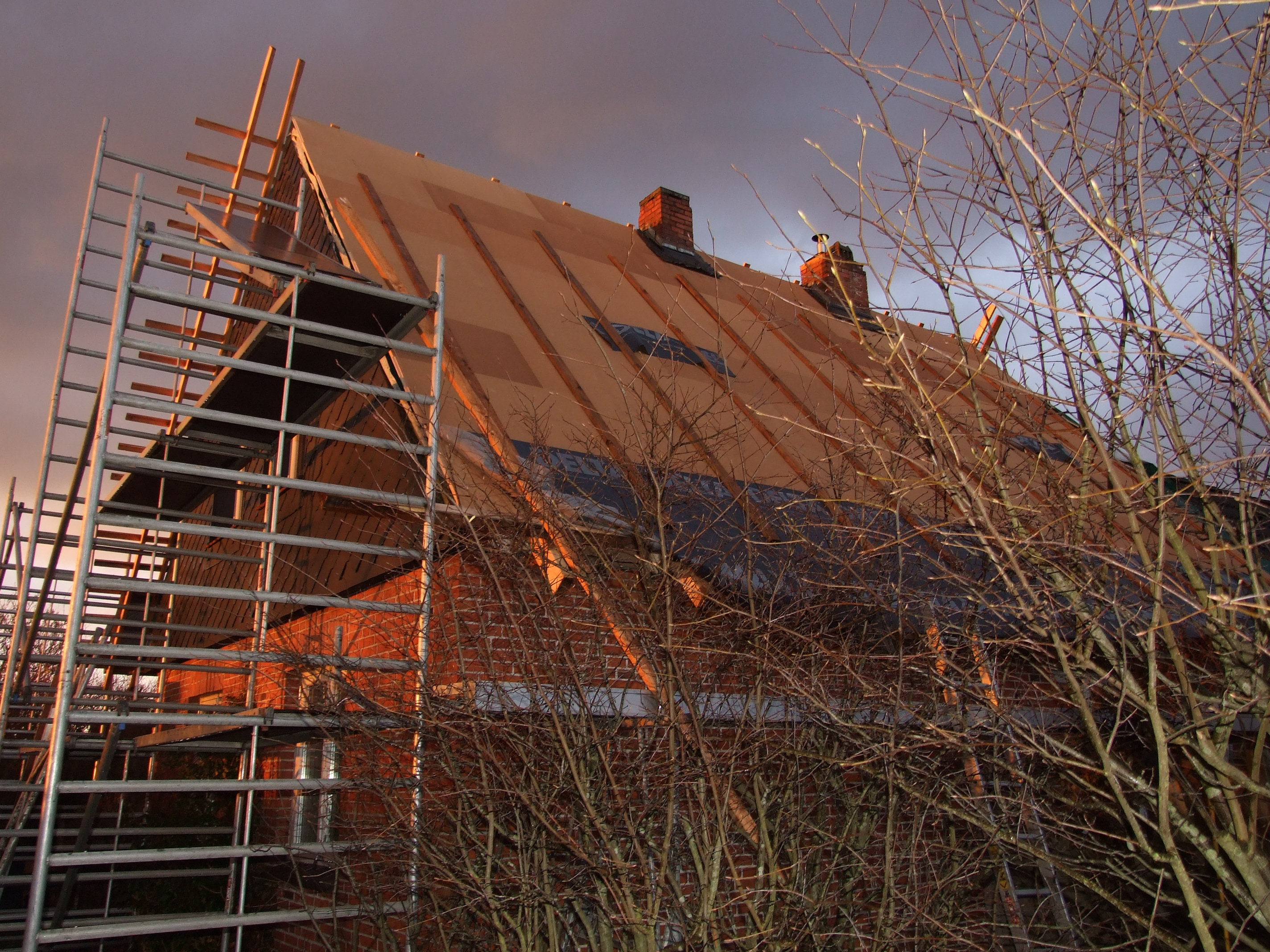 Holzfaserdämmplatte zur Aufdach-Wärmedämmung eines Einfamilienhauses in Schenefeld/Deutschland.